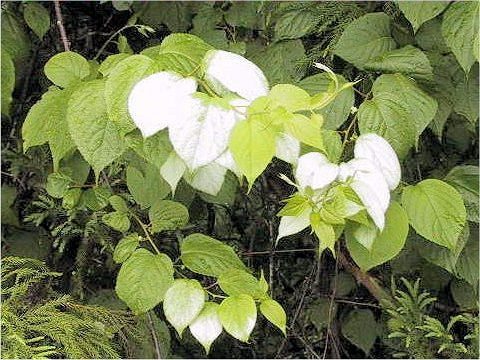 Actinidia polygama